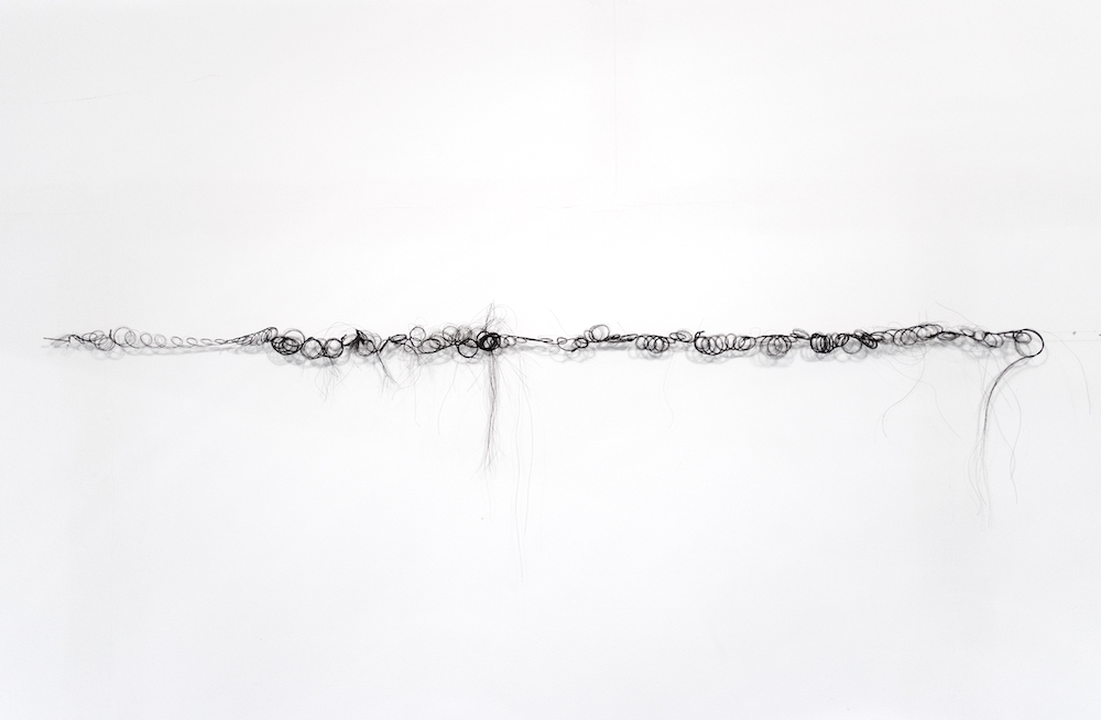 Œuvre